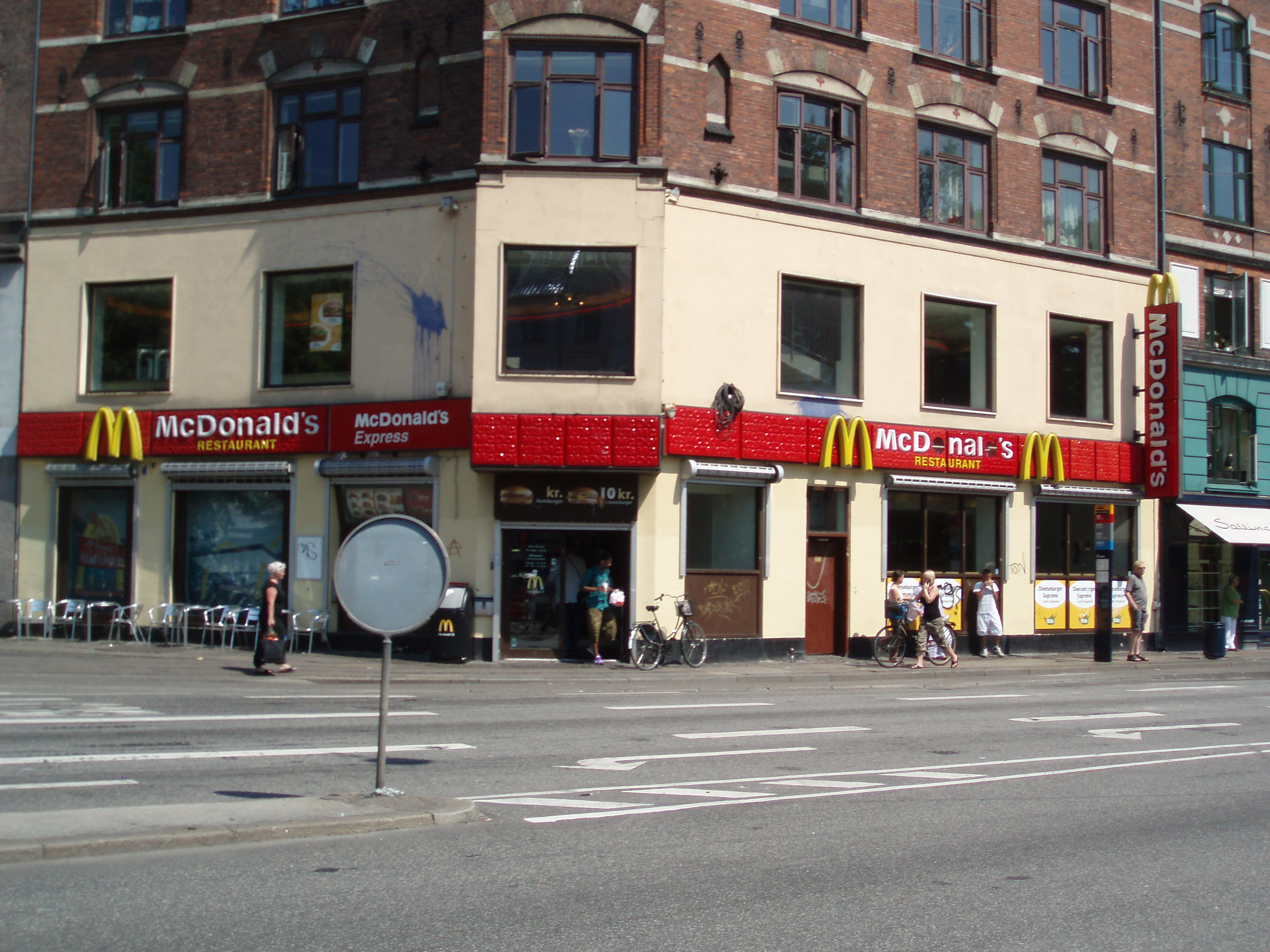 McDonald's på Nørrebros Runddel i Københanvn